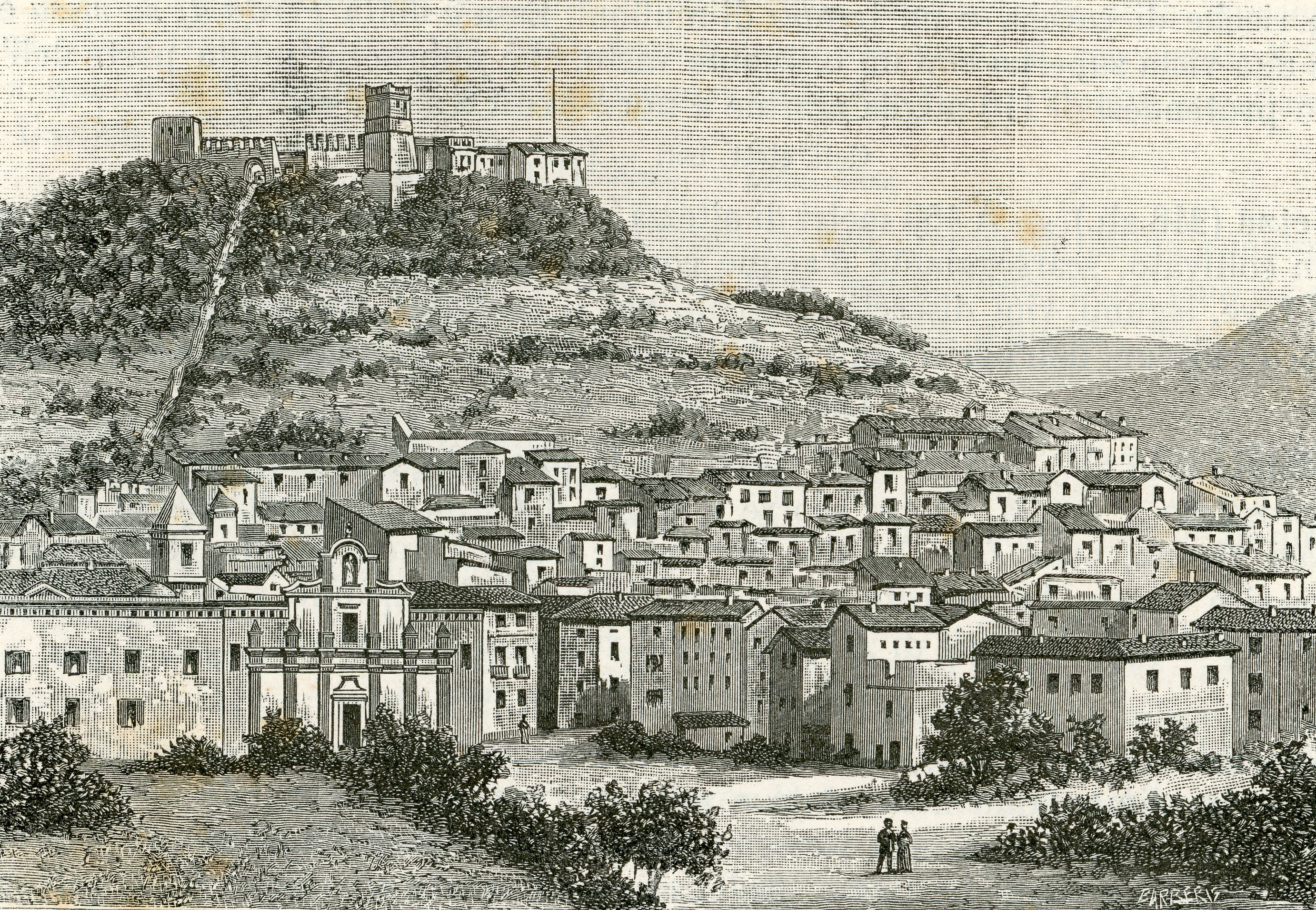 Bosa: Veduta del paese e del soprastante Castello dei Malaspina, xilografia di Barberis.